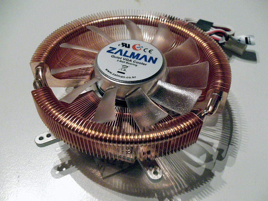 Zalman VF900-Cu LED VGA-Kühler